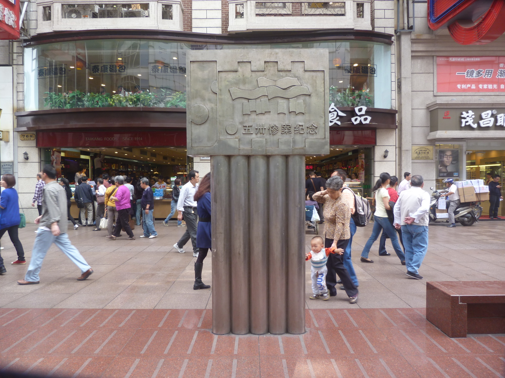 上海南京路五卅惨案纪念碑